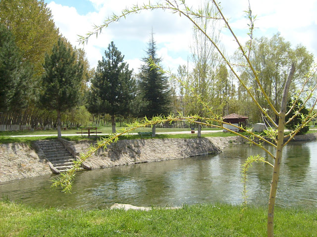 Eskişehir ili Sivrihisar ilçesi Subaşı mesire alanı fotoğrafı